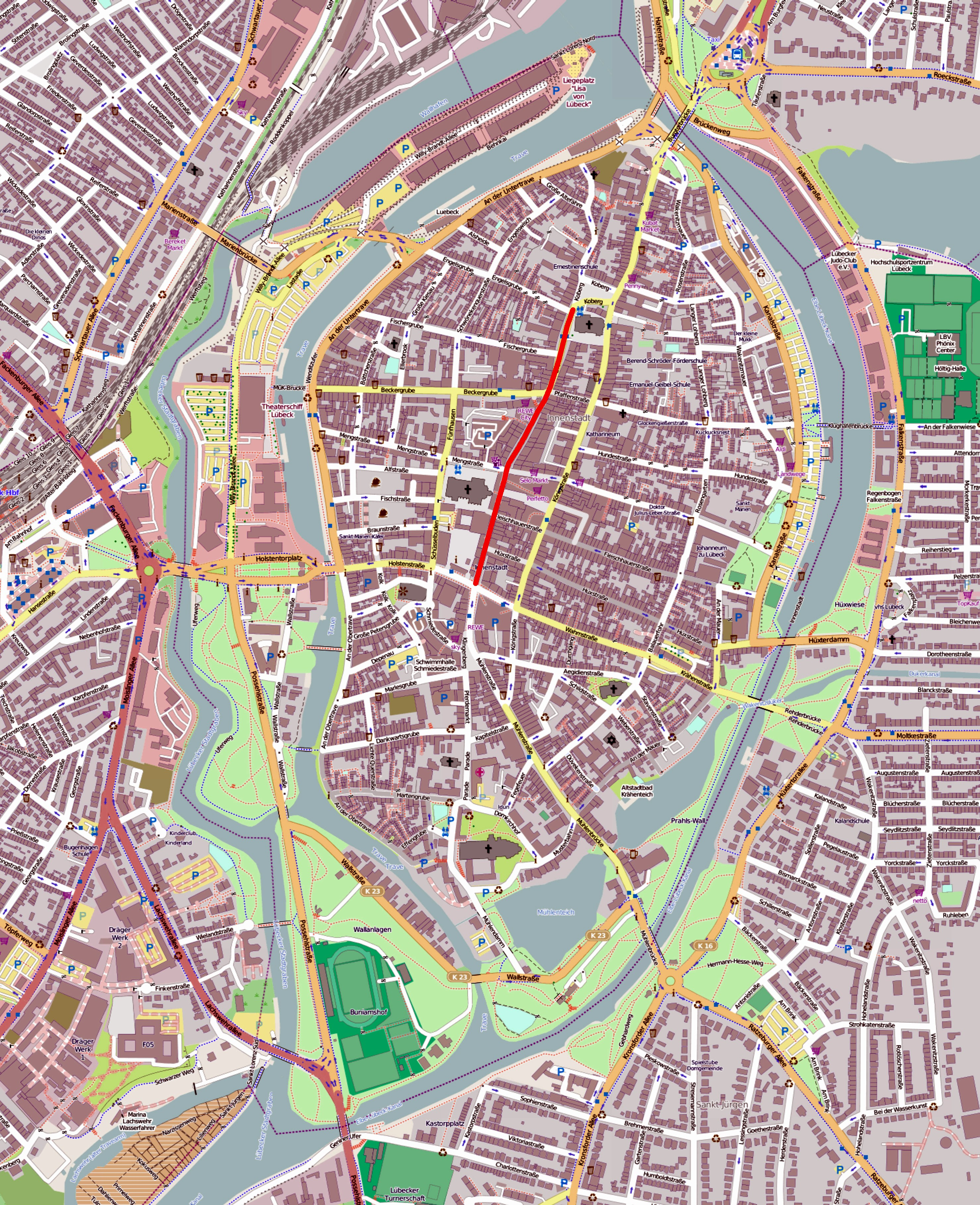 Die Breite Straße in Lübeck, rot markiert auf einer OpenStreetMap-Karte